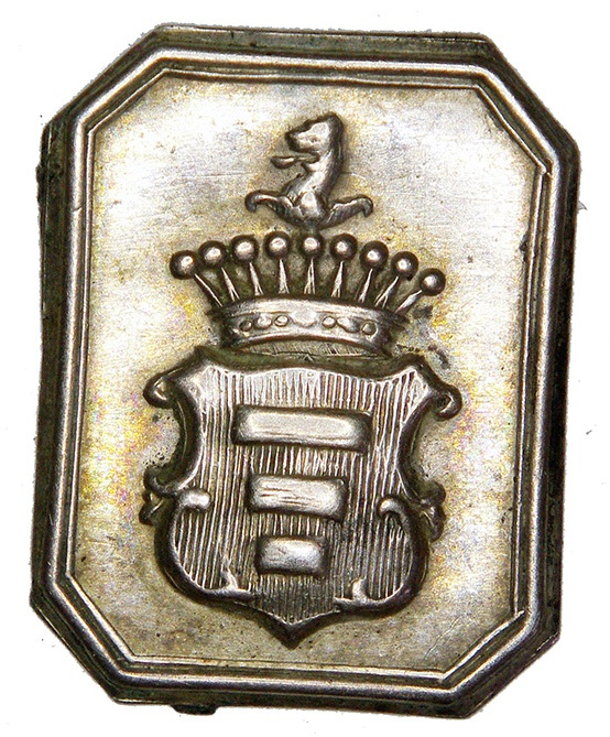 Російська імперія, царство Польське, кінець ХІХ - початок ХХ ст.